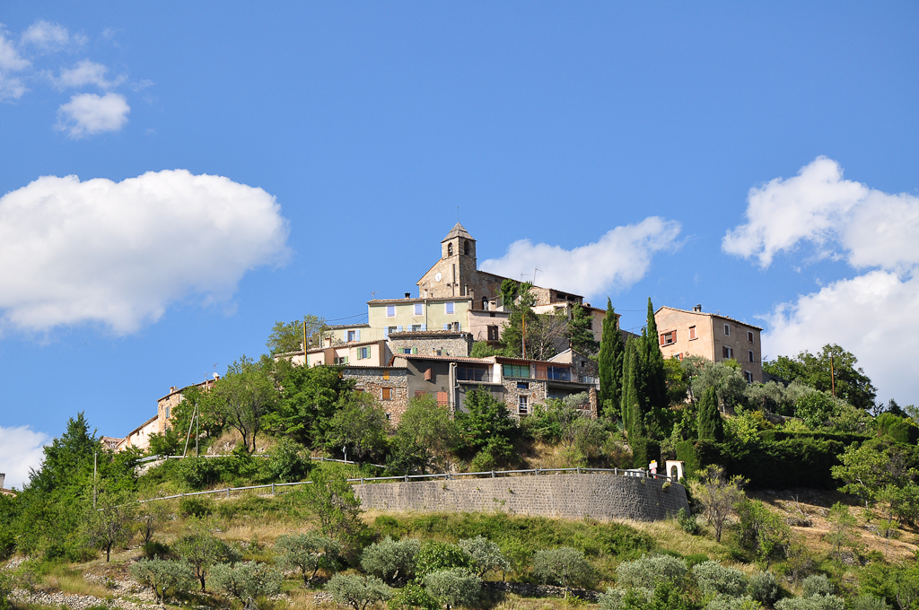 Castellet-lès-Sausses, vue générale